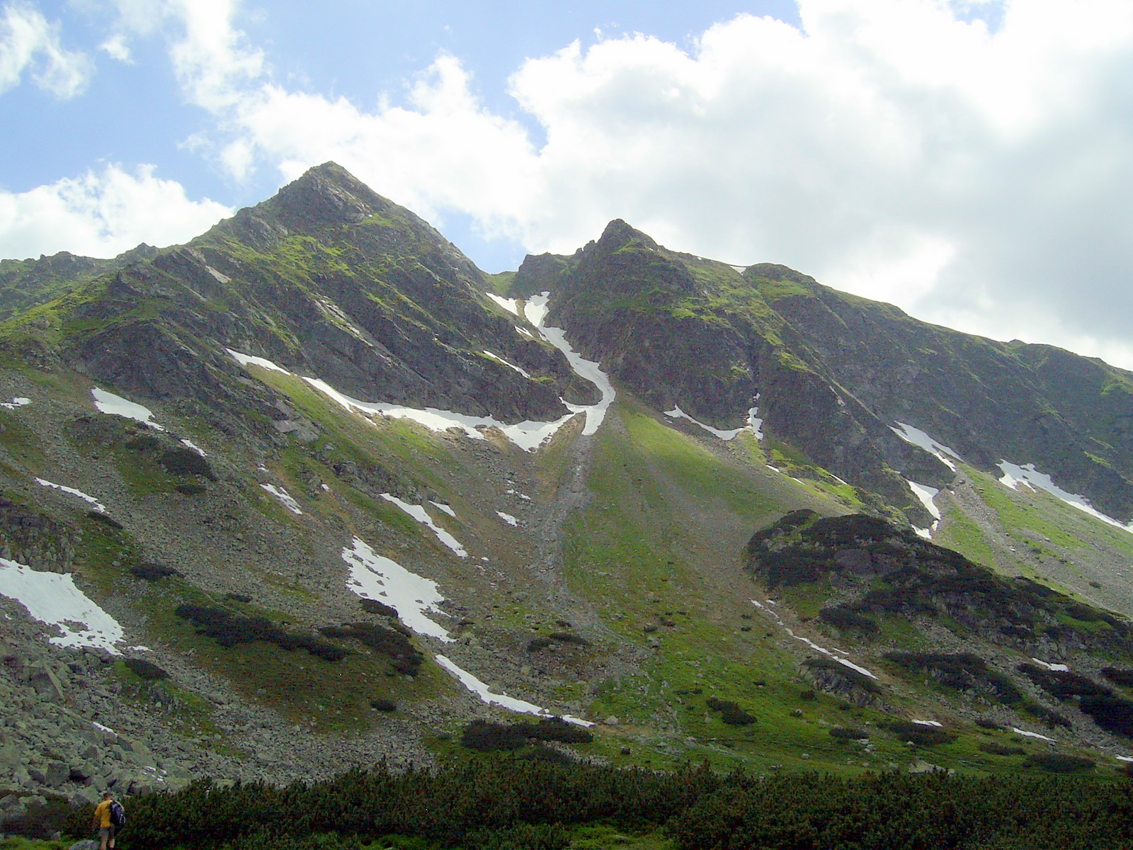 Pośrednia i Skrajna Turnia ze szlaku na Świnicką Przełęcz